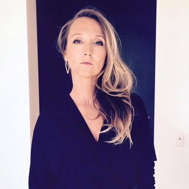 Audrey Lamy pose pour l'avant première d'Aladin